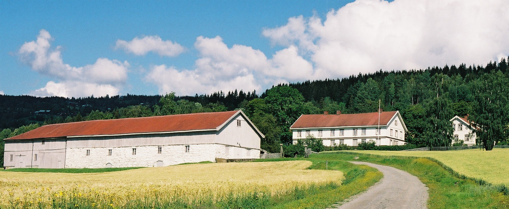 Lysgård, Lillehammer, Norway.